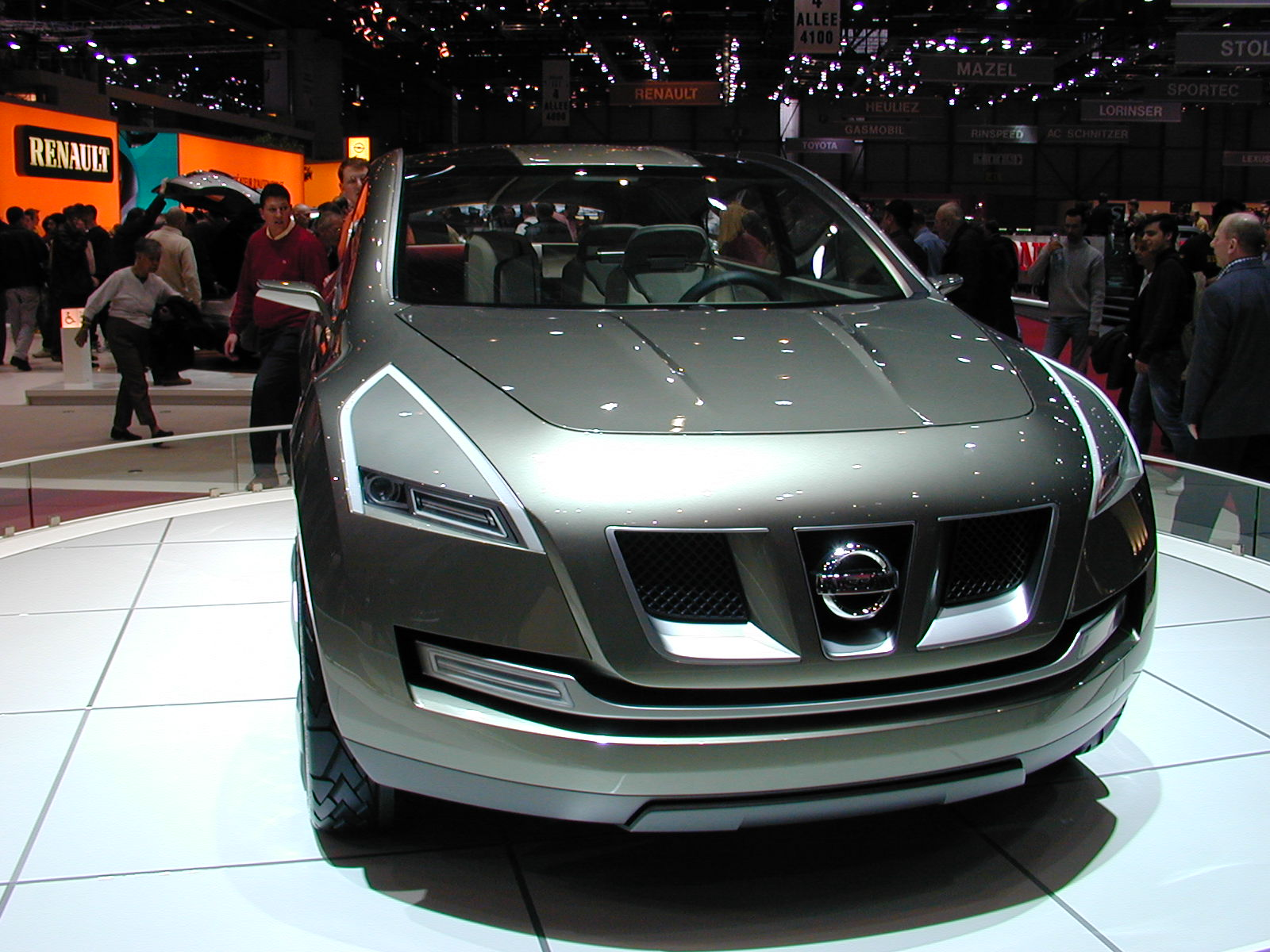 Salon de Genève 2004 SAG2004 130 Nissan prototype